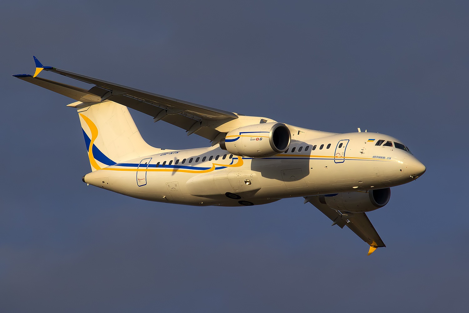 Antonov An-158 Kiev - Gostomel (Antonov) (UKKM) Ukraine, September 30, 2010 UR-NTN (cn 01-02)